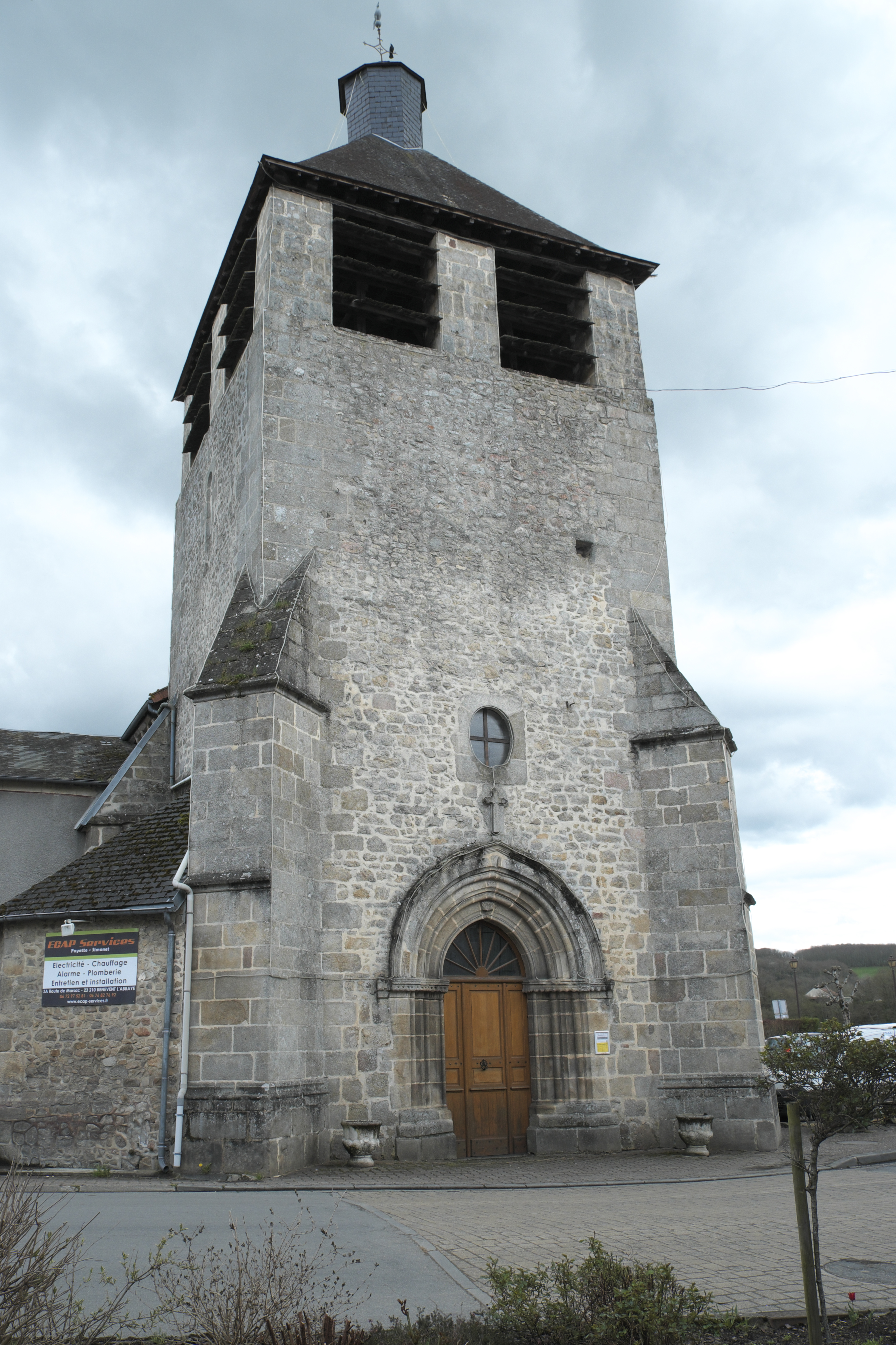 Katholische Kirche Saint-Étienne in Saint-Étienne-de-Fursac im Département Creuse (Nouvelle-Aquitaine/Frankreich), Glockenturm mit Portal